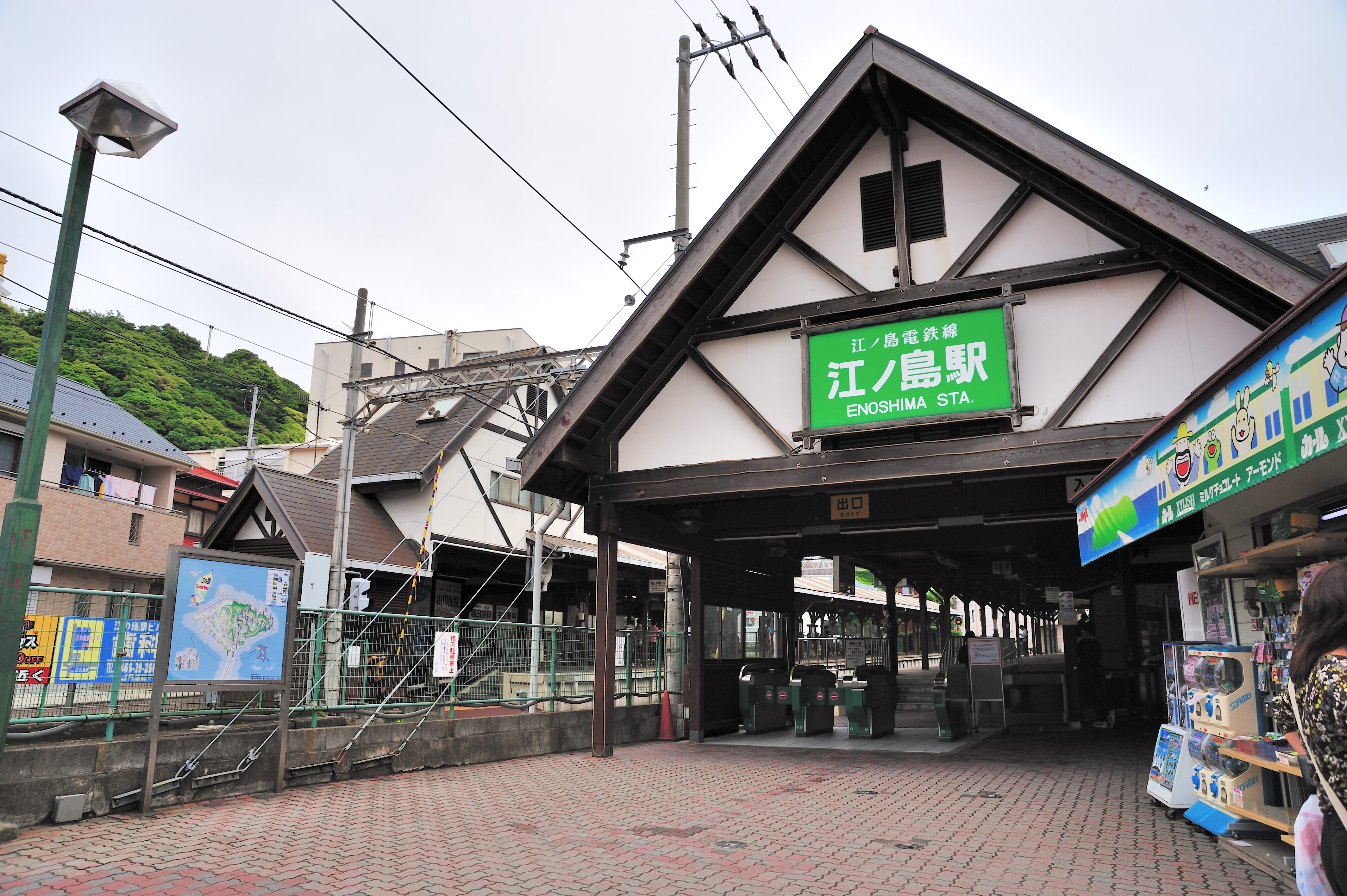 江之島電鐵 江之島車站